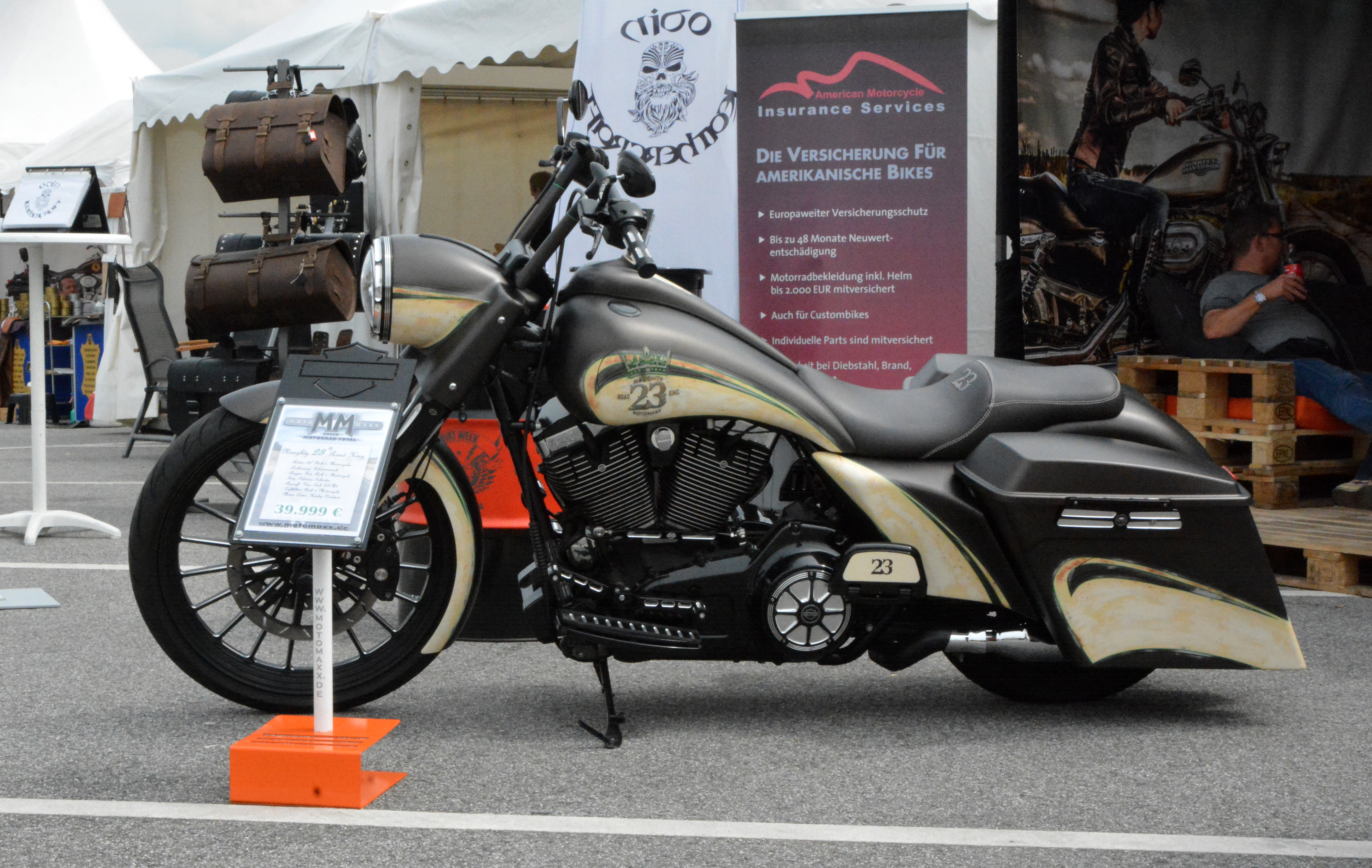 Motorrad bei den „Hamburg Harley Days 2015“